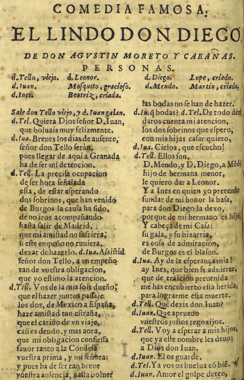 Íncipit (f. 100v) de la Comedia famosa «El lindo don Diego» (ed. facsímil). Edición digital: Alicante, Biblioteca Virtual Miguel de Cervantes; Madrid, Biblioteca Nacional, 2010. Reproducción digital a partir de la Parte diez y ocho de comedias nuevas escogidas de los mejores ingenios de España ..., Madrid, Gregorio Rodríguez, 1662, f. 100v.-120v. Localización: Biblioteca Nacional (España). Sig. R/22671.